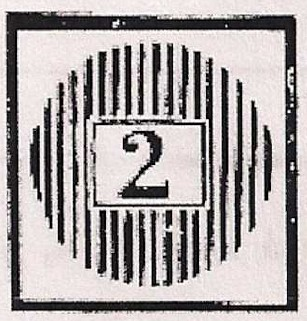 Oblitération de distribution (18 barres verticales) pour le bureau d'Amay, ouvert en 1838